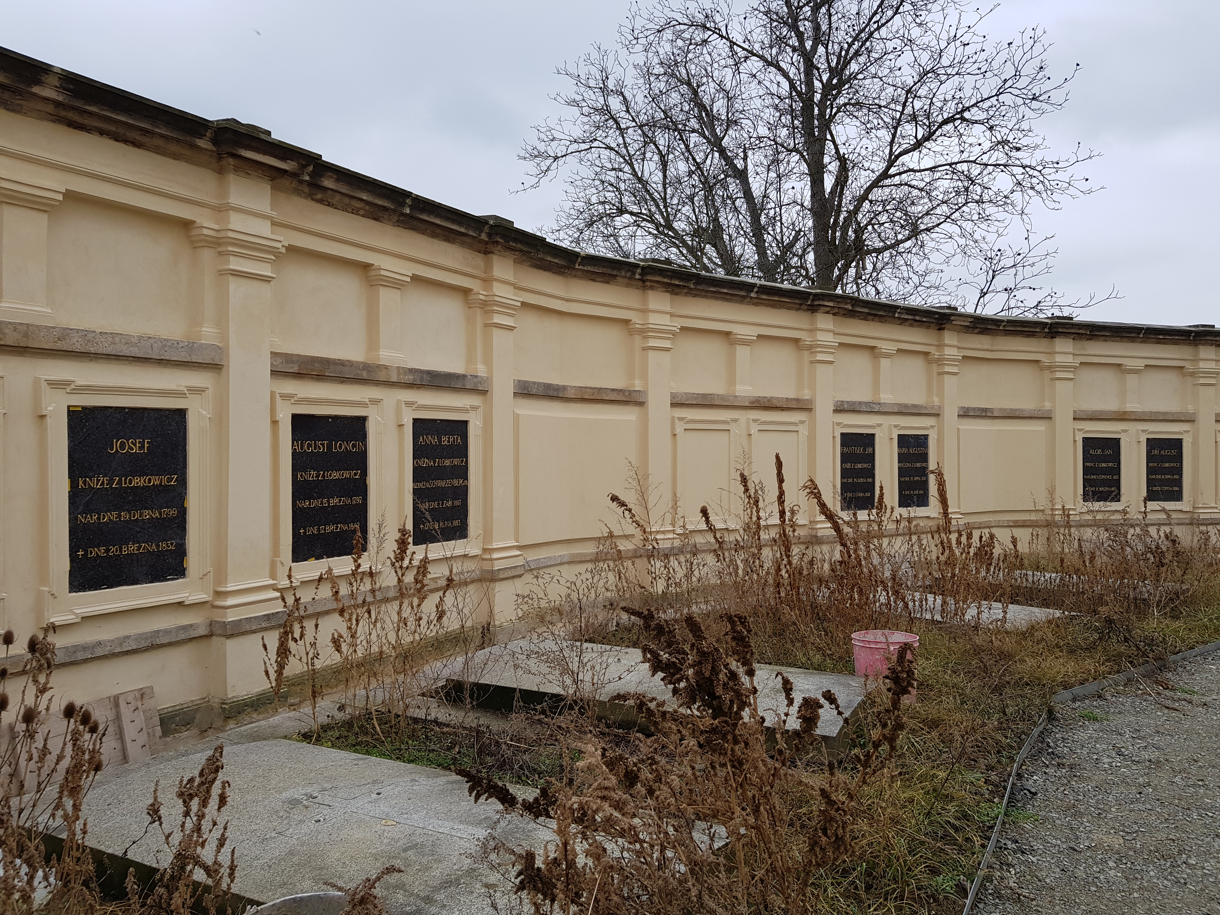 Lobkovická hrobka na hřbitově v Hoříně, okres Mělník